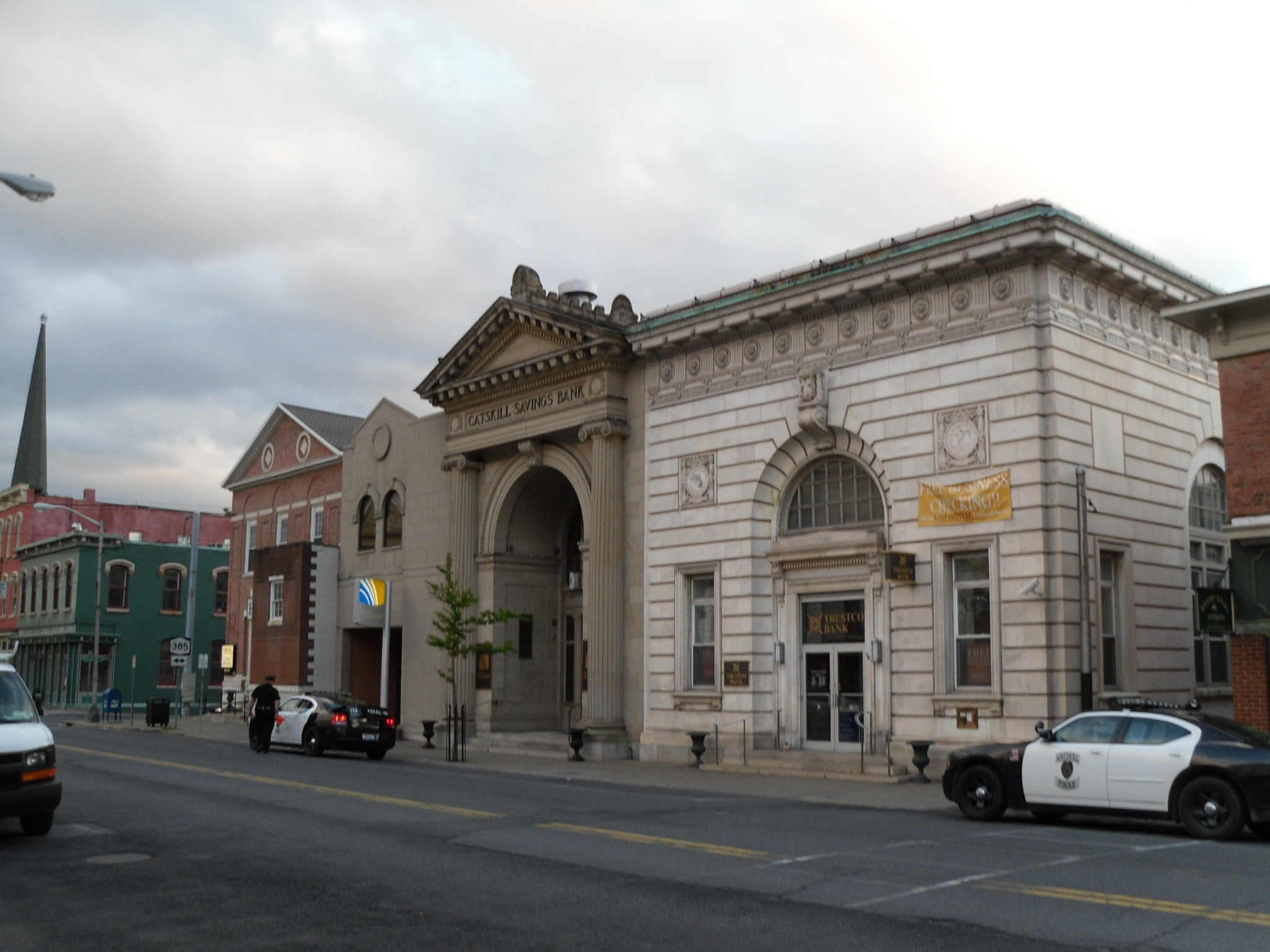 Catskill, New York